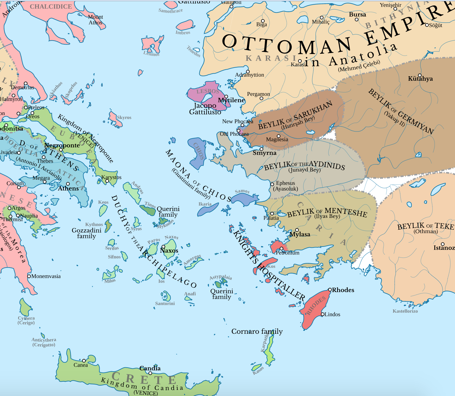 Балканы и Анатолия во второй половине 14 века